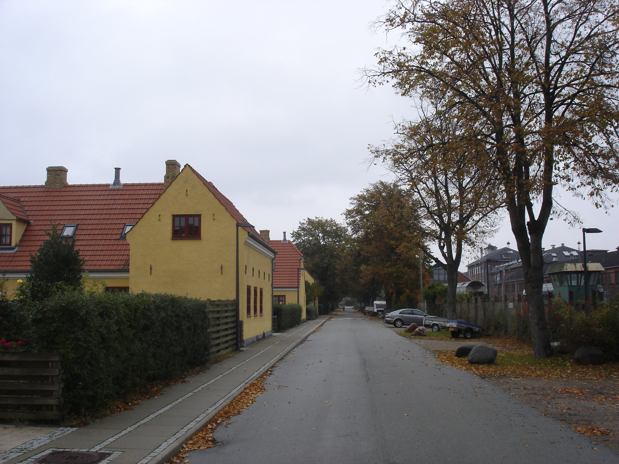 Den Gule By på Otto Busses Vej, set fra V